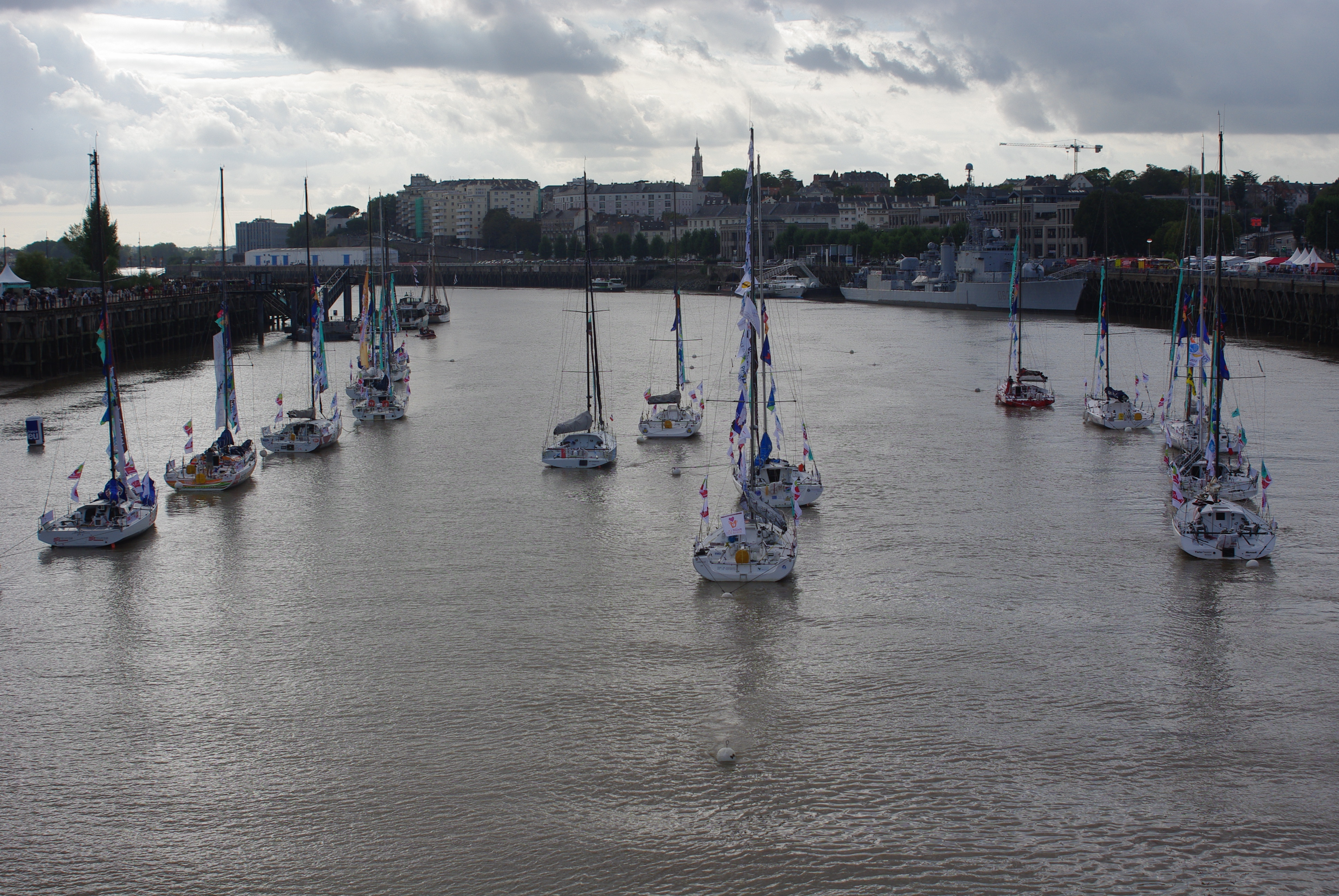 Flotille de la Solidaire du Chocolat 2009, à Nantes, Loire-Atlantique, France.